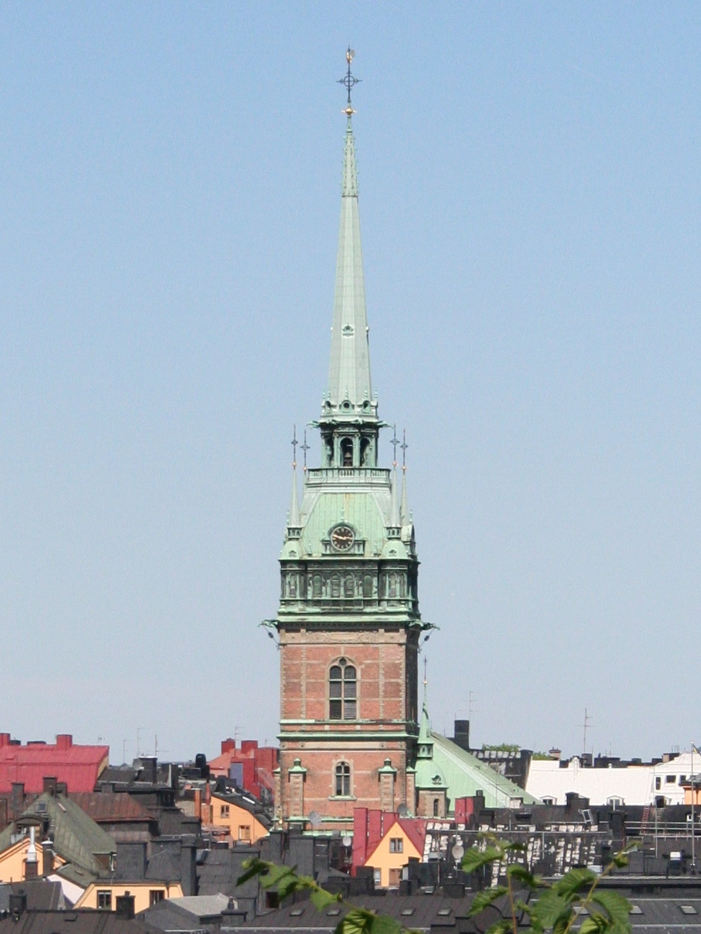 Tornet på Tyska kyrkan i Stockholm. Källa: Eget foto, fotograf User:EnDumEn 8 juni 2007